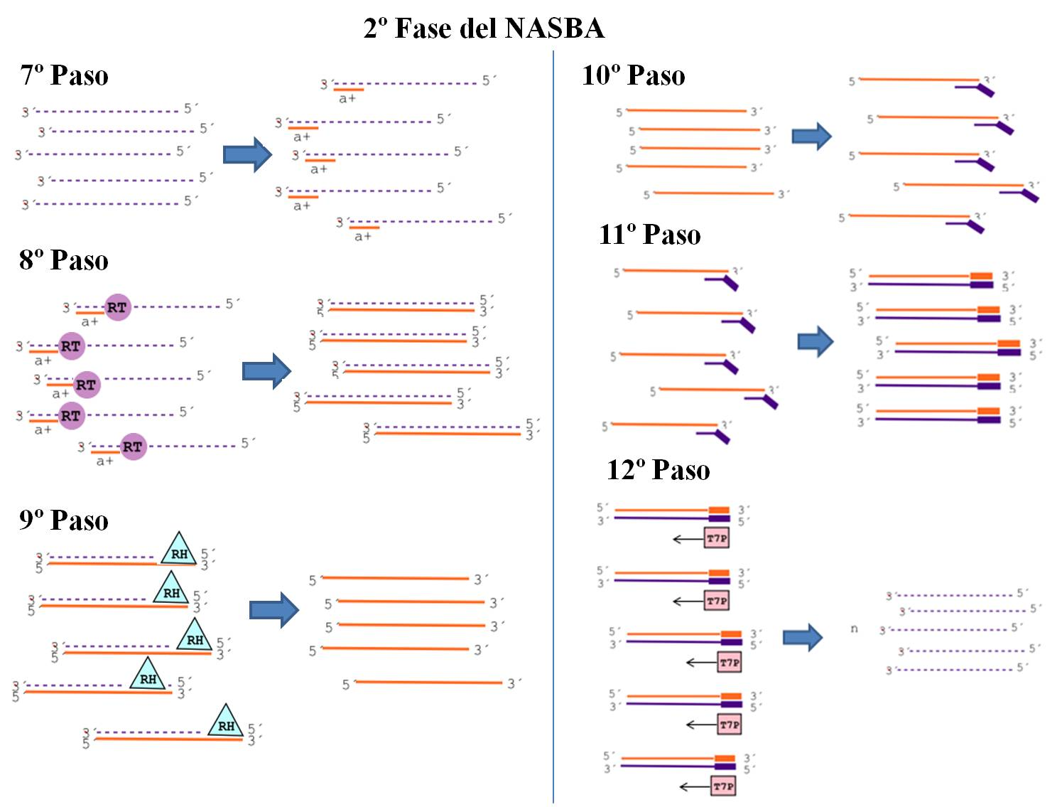 En esta imagen se observan los pasos que tienen lugar en la fase 2 del NASBA.